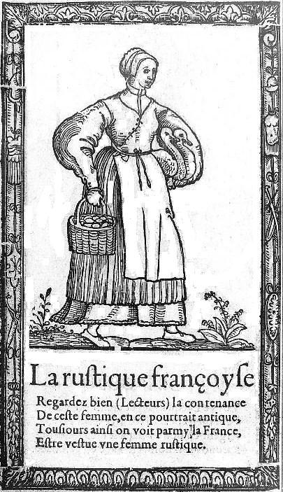 Illustration du Recueil de la diversité des habits qui sont de présent usage tant es pays d'Europe, Asie, Afrique et isles sauvages... par François Deserps, éditeur : R. Breton, Paris 1567.